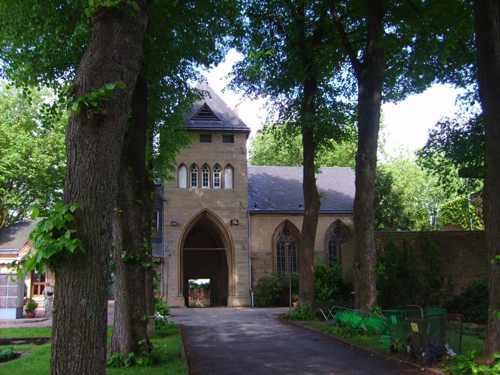 Friedhofskapelle und Haupttor des lutherischen Friedhofs an der Hochstraße, Wuppertal-Elberfeld, Germany